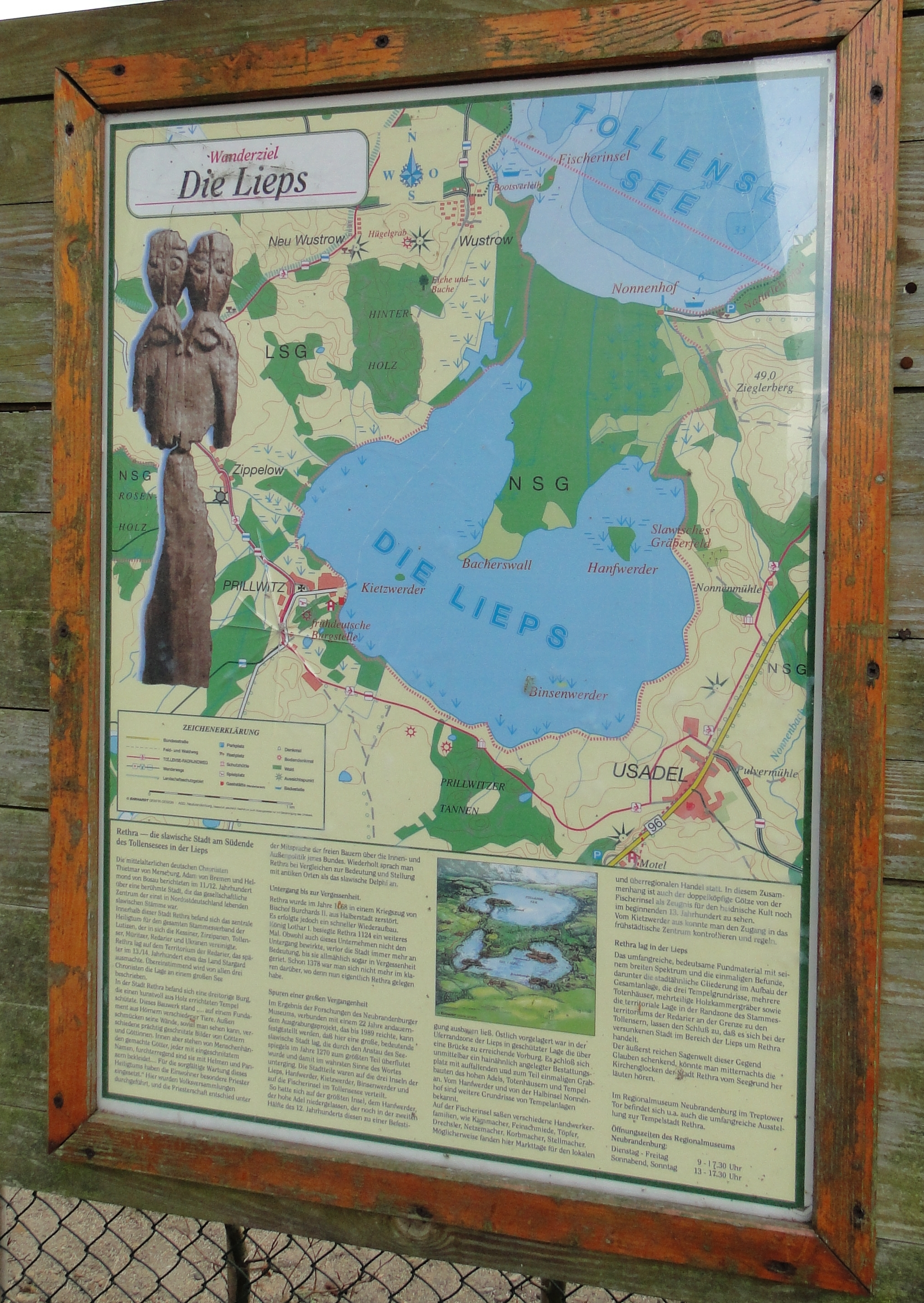 Infotafel Lieps am Jagdschloss Prillwitz. Naturschutzgebiet Nonnenhof, Mecklenburg-Vorpommern.